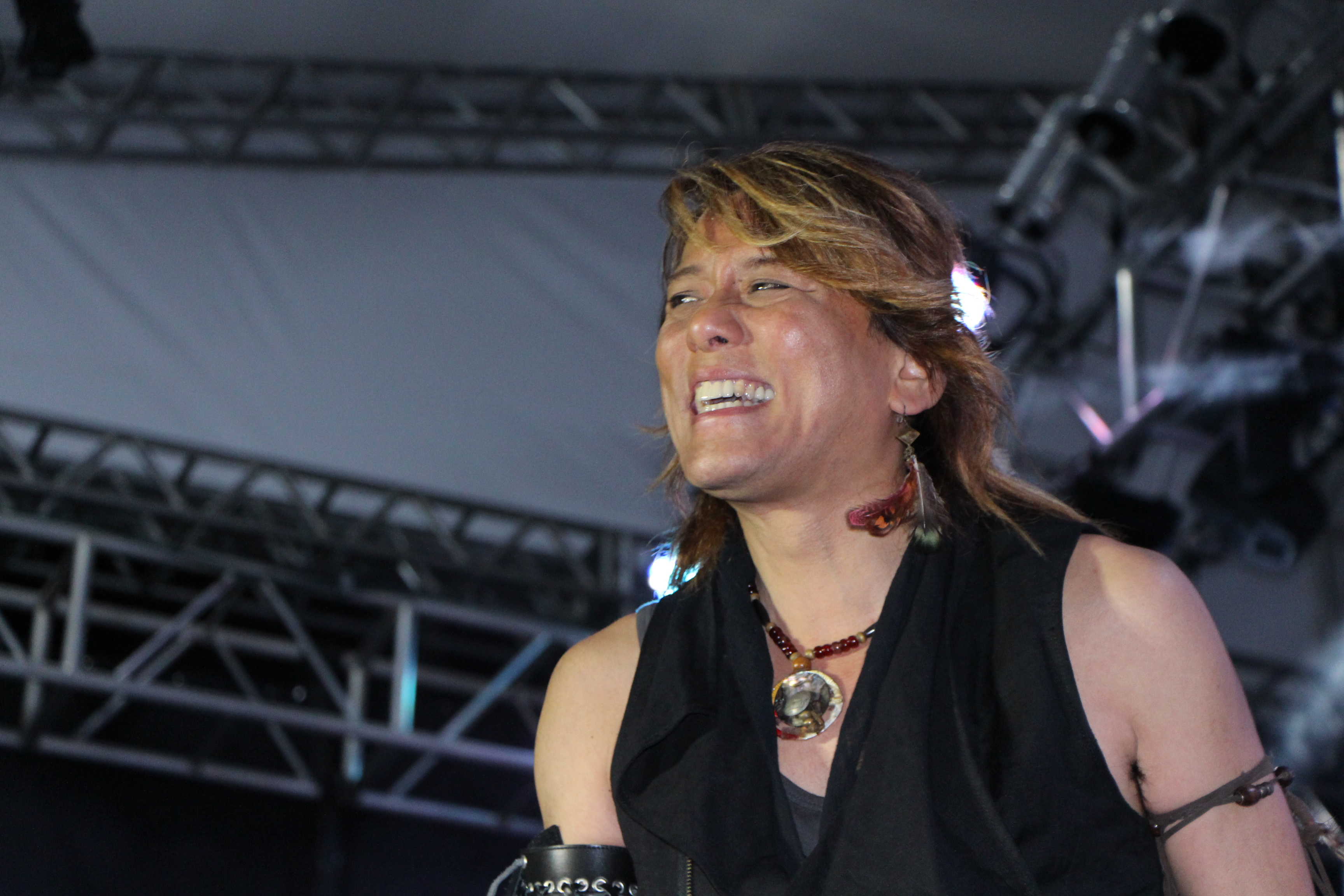 中文（台灣）: 山田信夫於Anime Friends 2013公演。